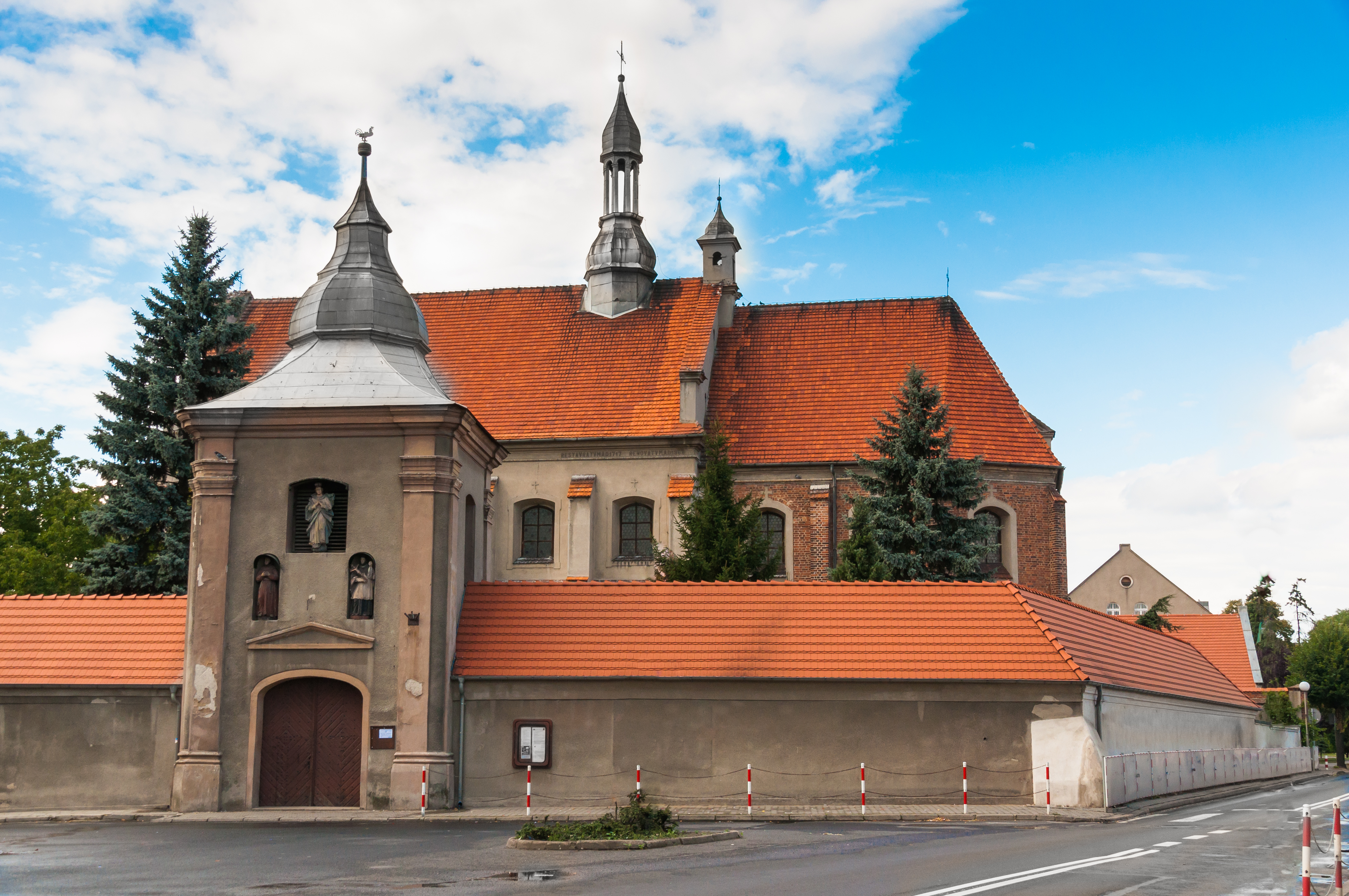 Koźmin Wielkopolski, kościół p.w. św. Stanisława, ob. par., 1648, 1670